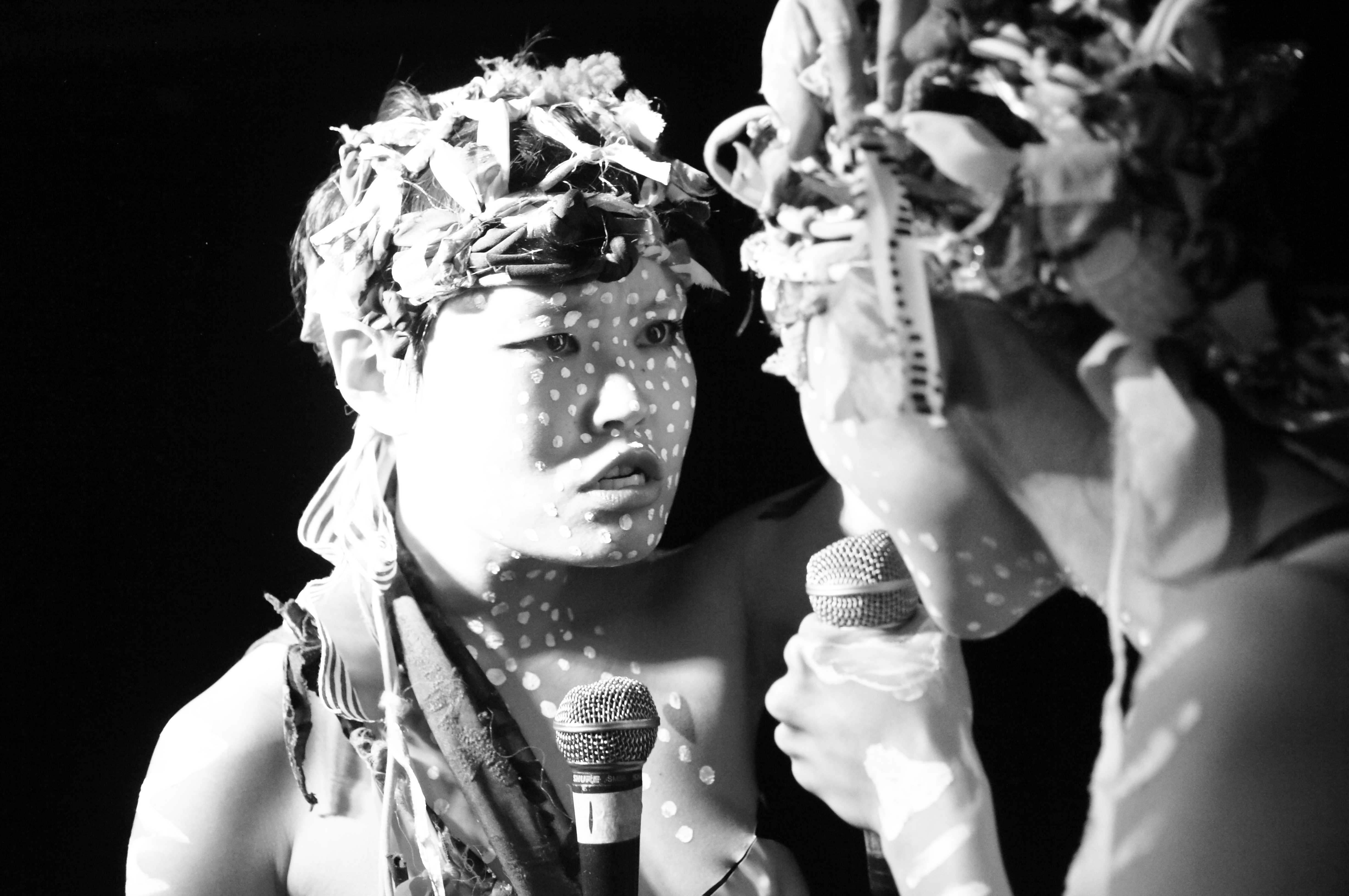 Trippple Nippples live on stage, 2011.